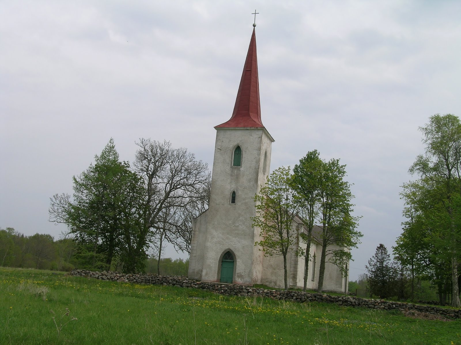 Jämaja kirik